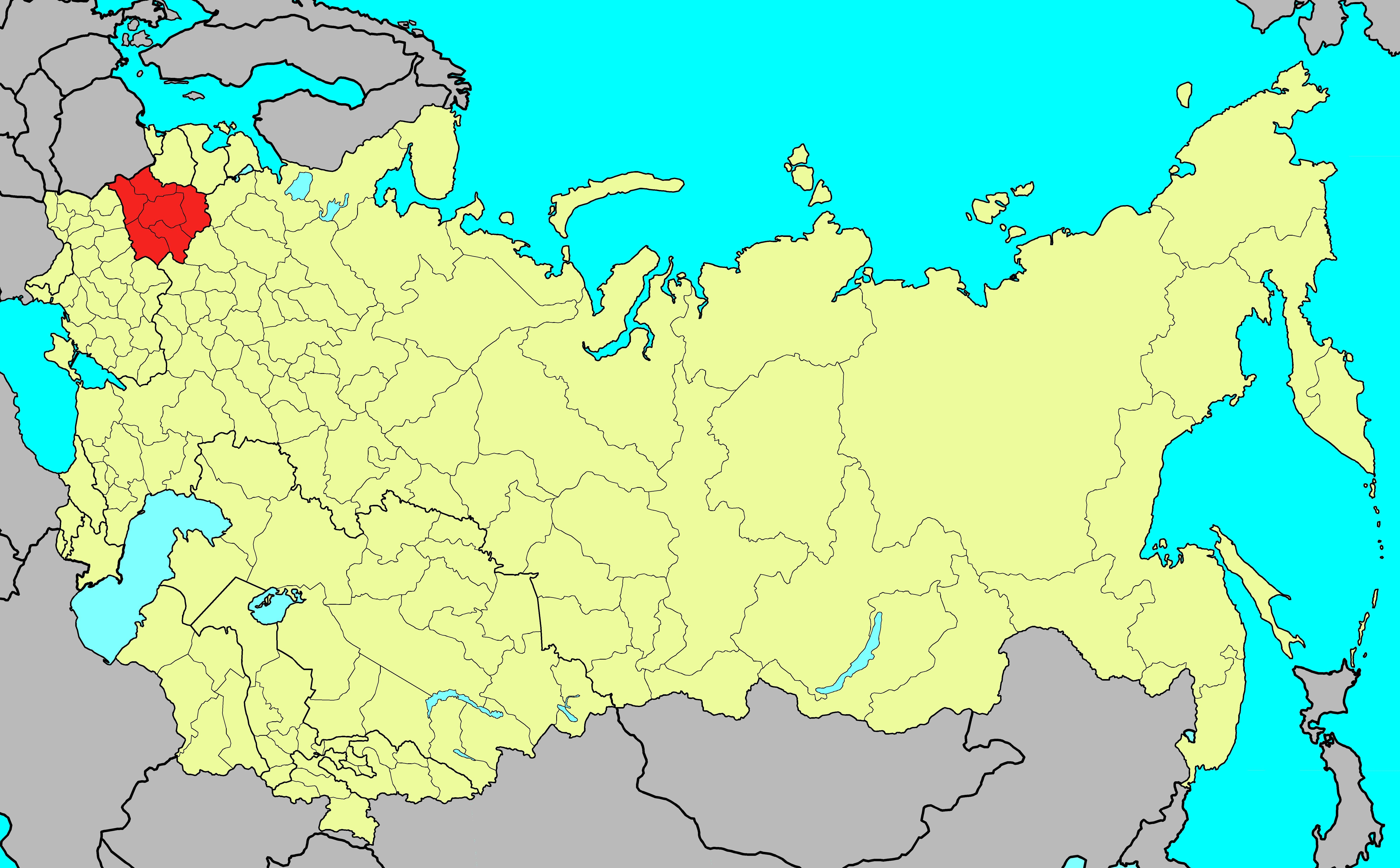 Белорусский военный округ ВС СССР на 1991 год